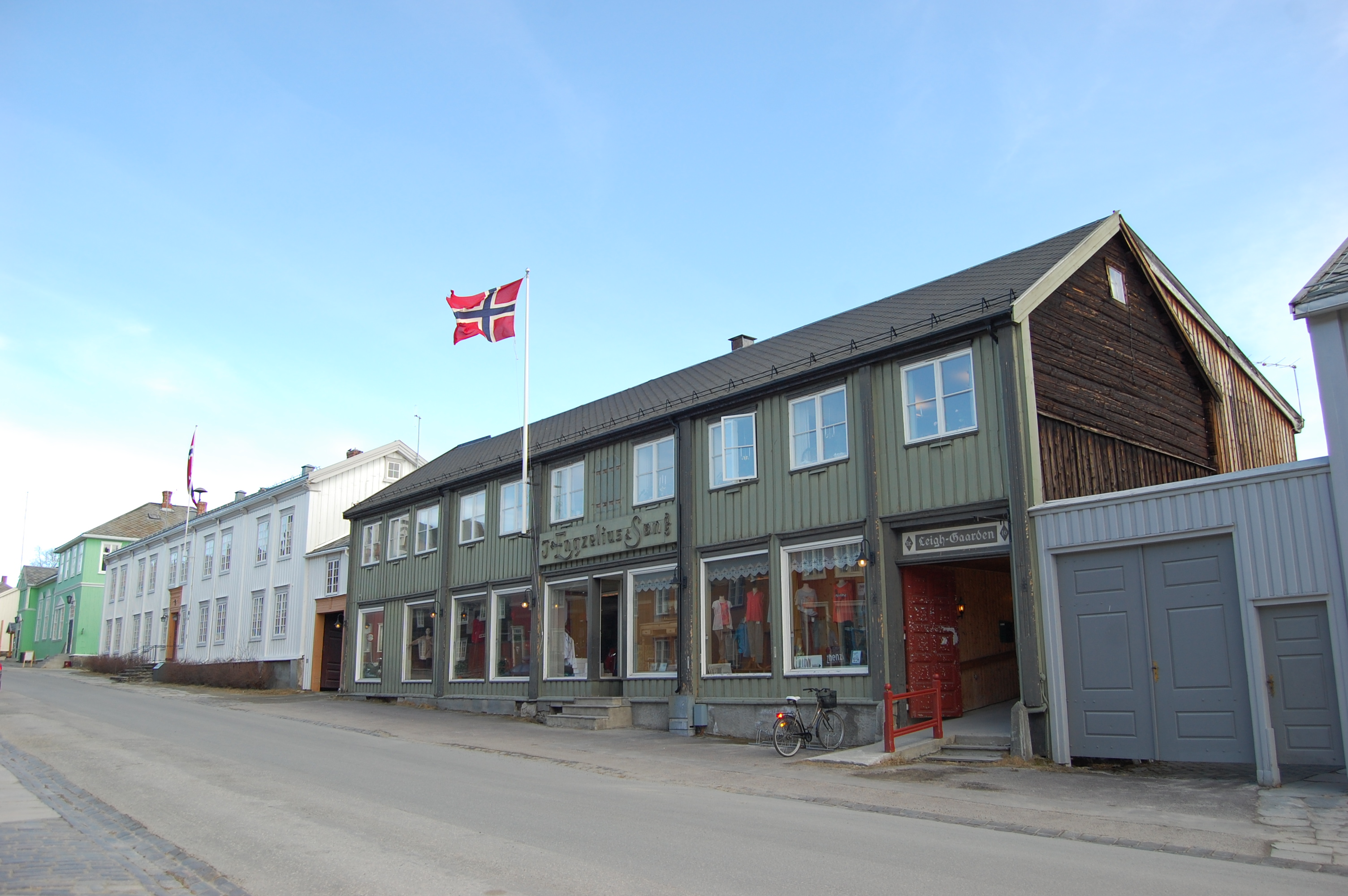 Kulturminnefondet er lokalisert i Leighgaarden i Bergmannsgata på Røros. Foto: Einar Engen/Norsk Kulturminnefond